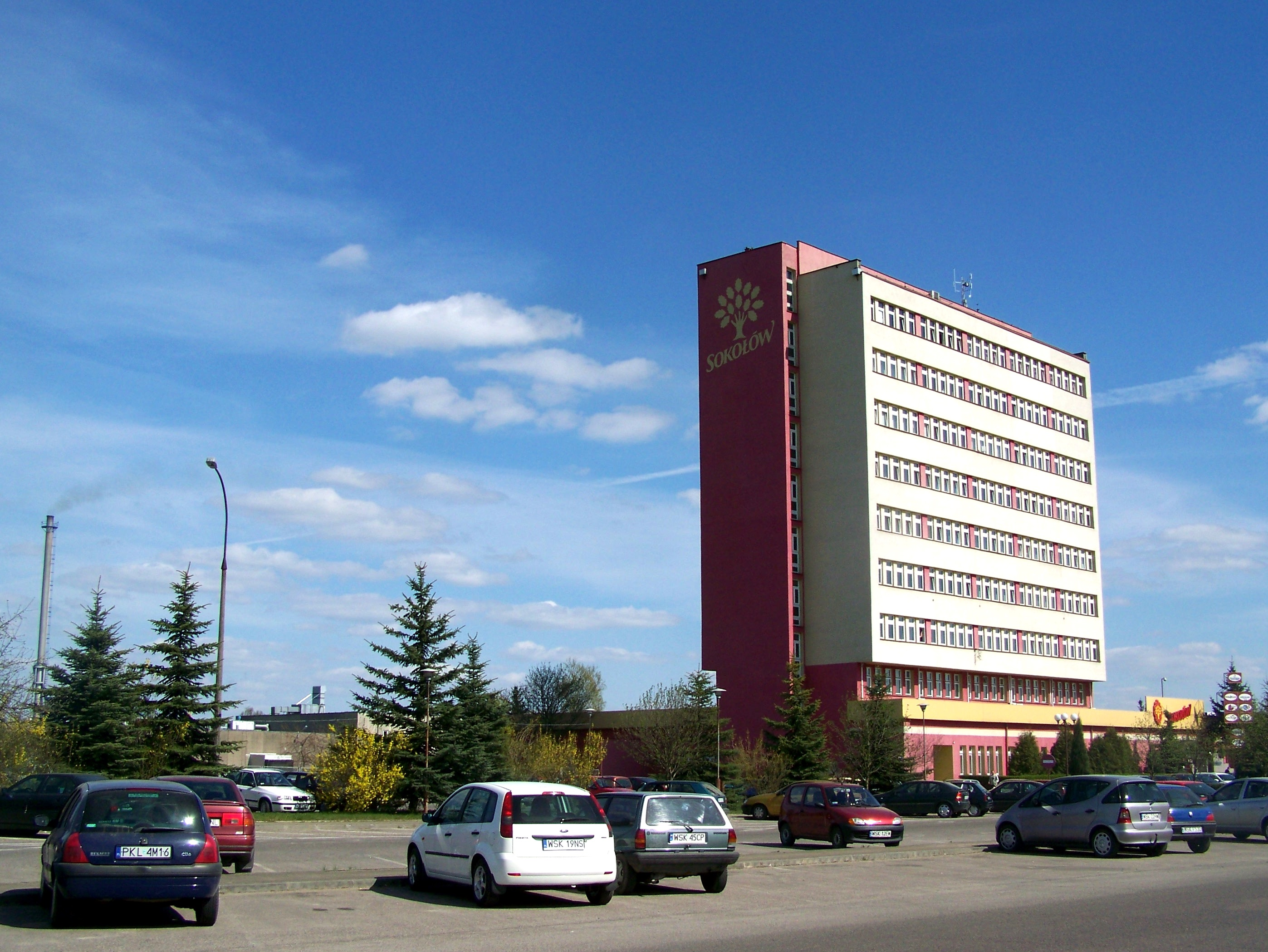 Zakłady Mięsne "Sokołów", odział w Sokołowie Podlaskim